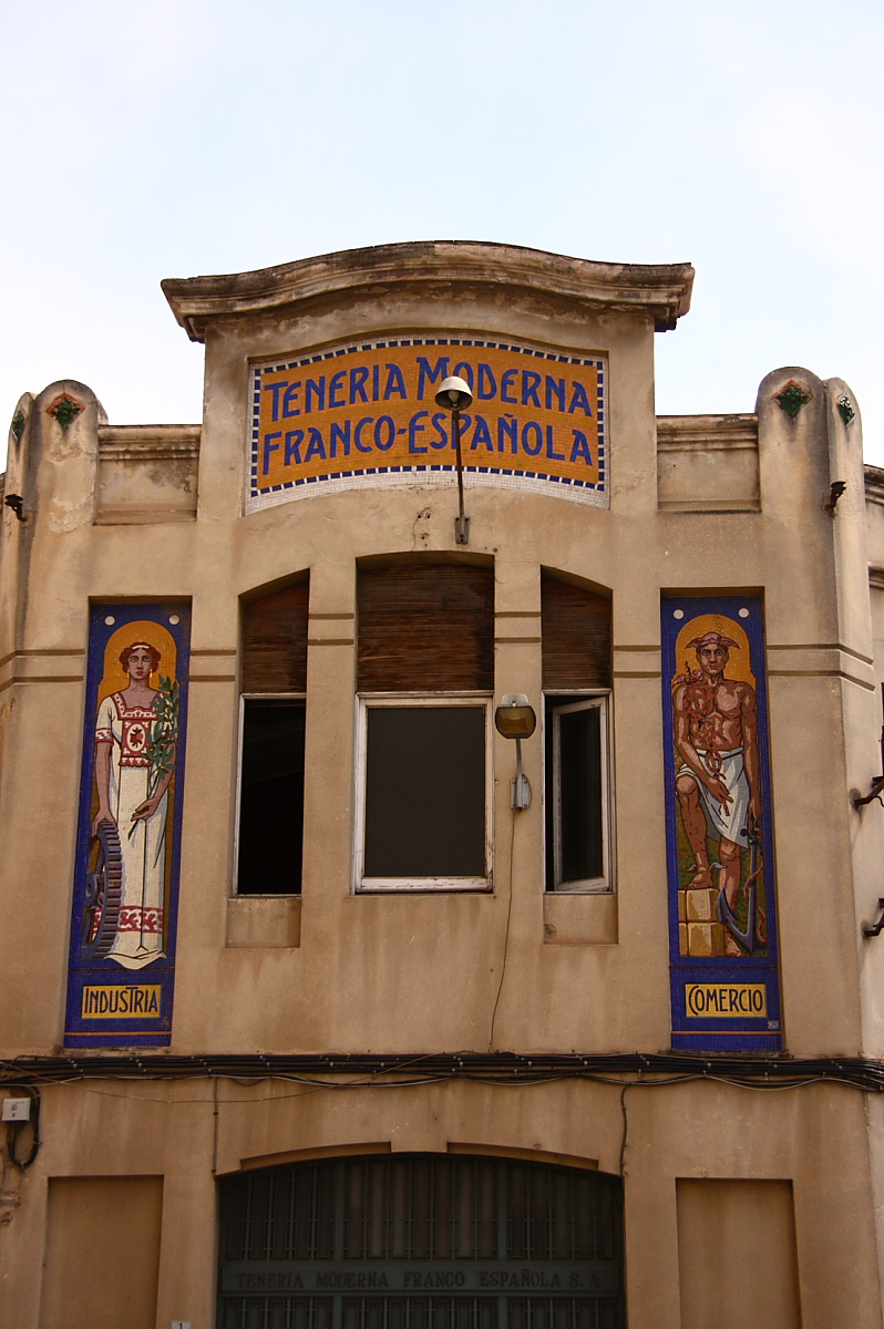 Mosaics de Lluís Bru a la "Teneria Moderna Franco-Española" a Mollet del Vallès (Catalunya)